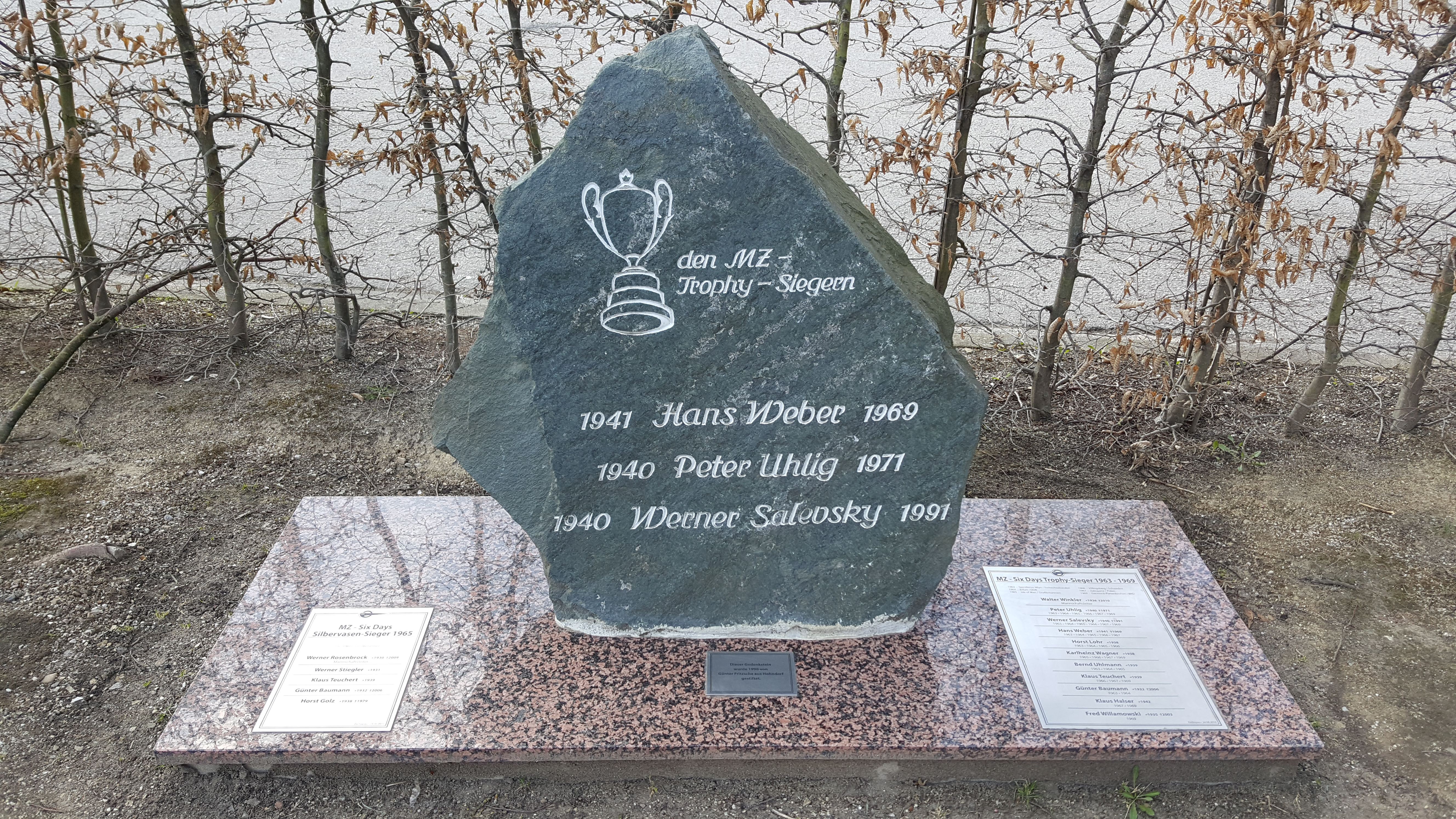 Gedenkstein für die verunglückten MZ Six Days Trophy-Sieger Peter Uhlig, Hans Weber und Werner Salevsky am Standort im Schlosshof von Schloss Wildeck in Zschopau.